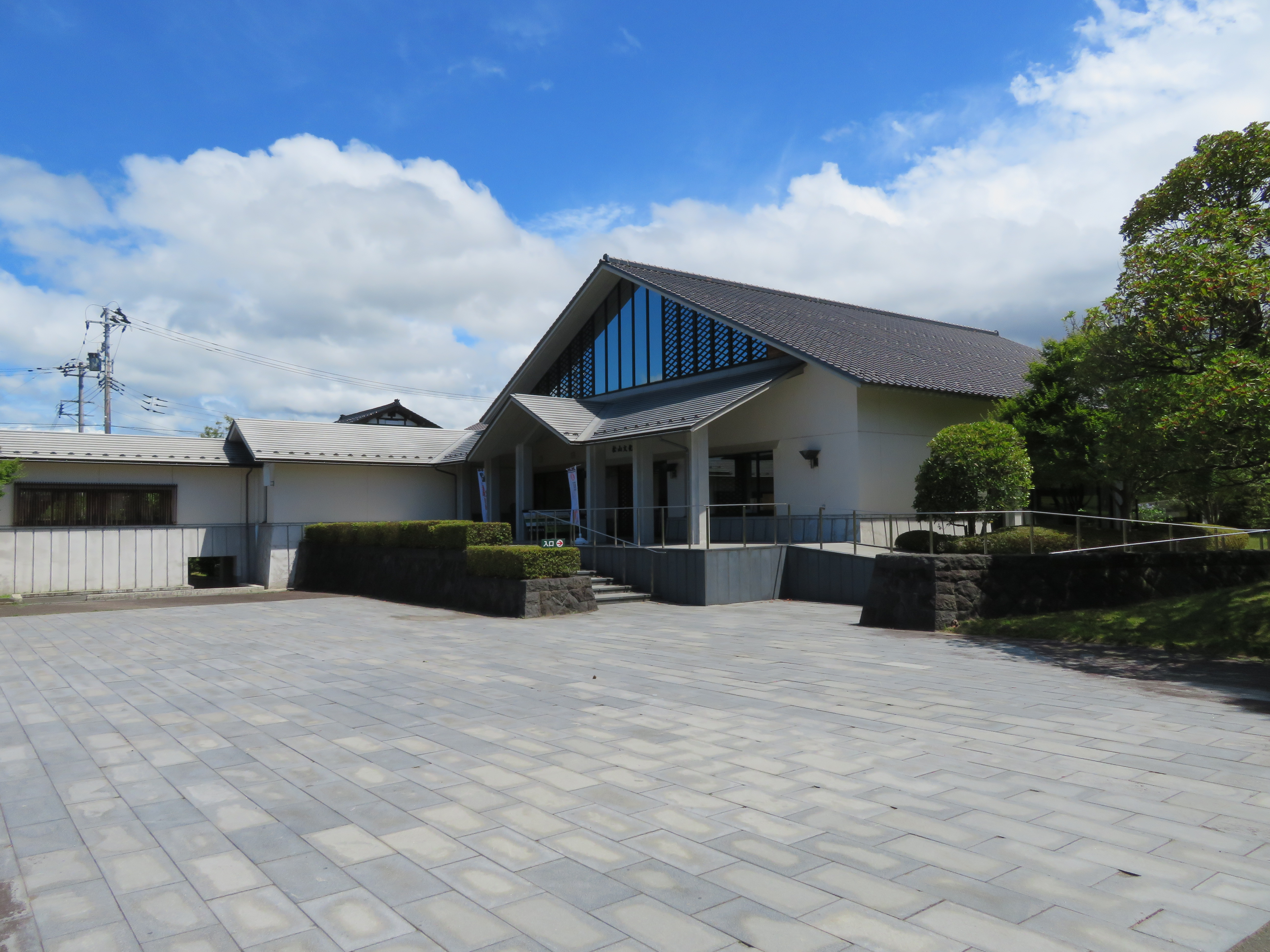 山形県酒田市に所在する松山文化伝承館本館 Canon PowerShot SX720 HS